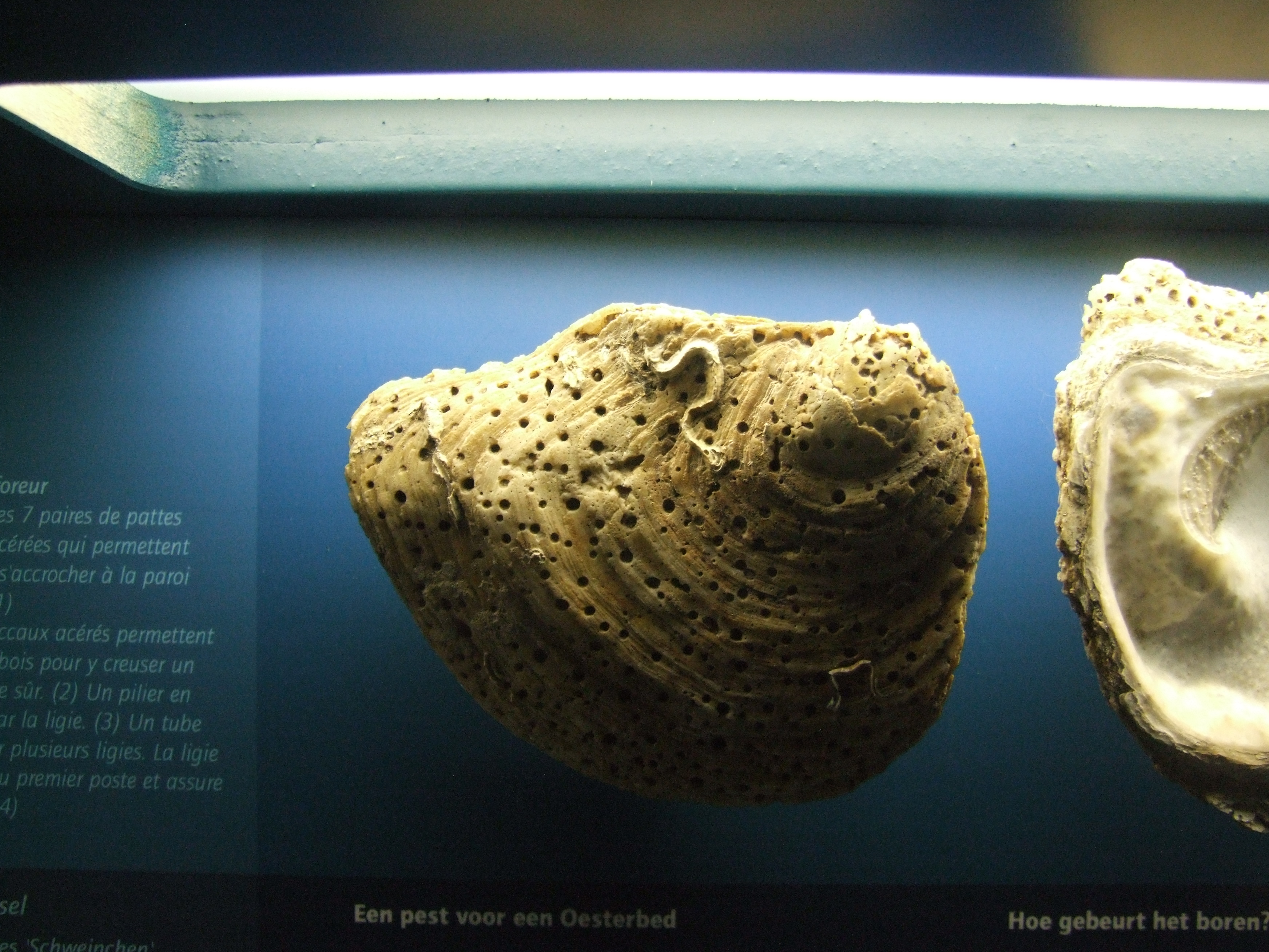 Eine Auster mit Austernpest. Gut sichtbar die Bohrlöcher des Gelben Bohrschwamms, Exponat im Besucherzentrum De Nachtegaal, De Panne, Belgien